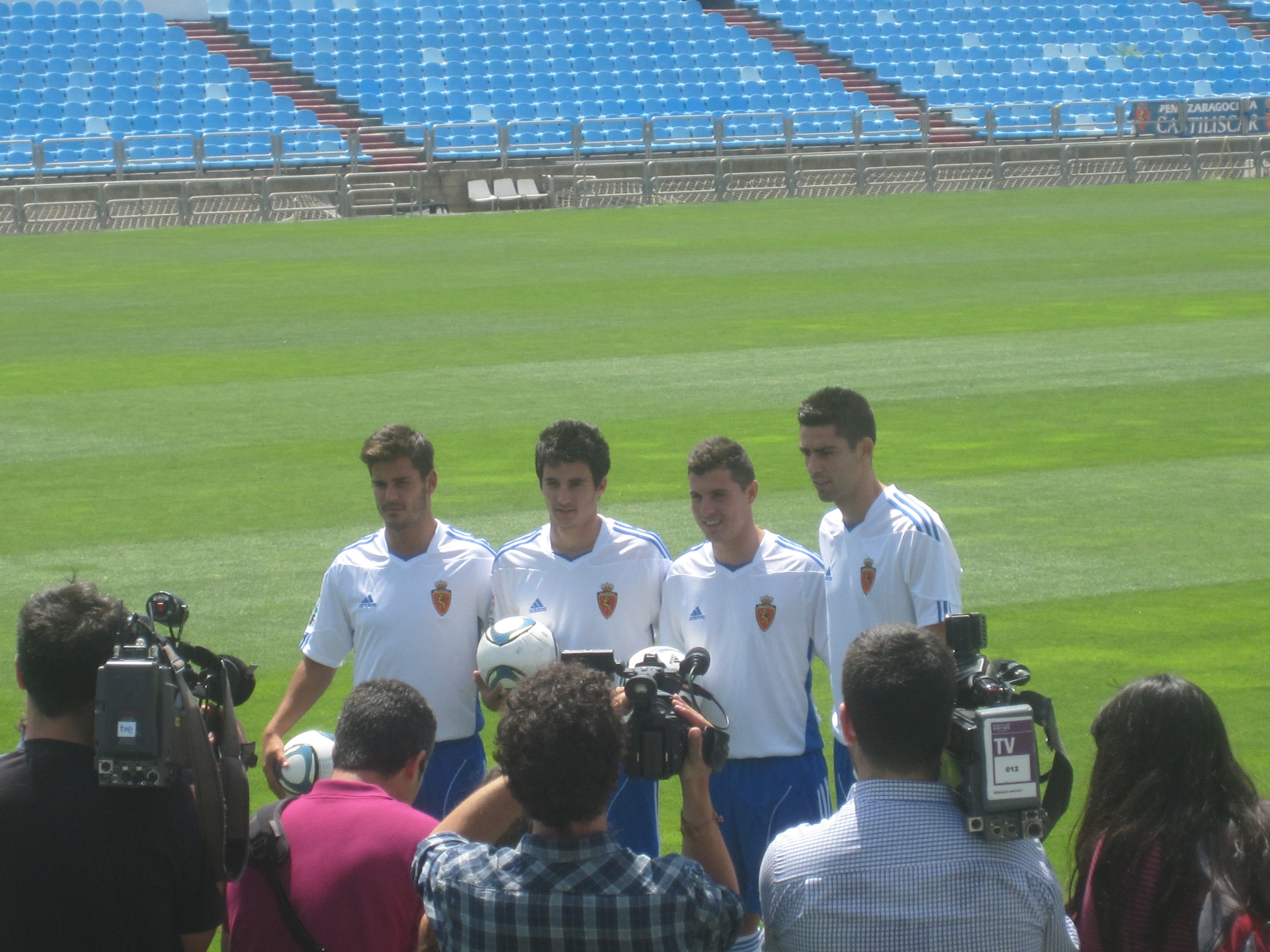 Presentación de los jugadores del Real Zaragoza Abraham Minero, Edu Oriol, Juan Carlos Pérez y David Mateos, el dia 12 de julio del 2011.